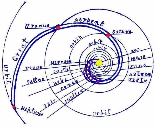 Великий Змей в Сечении.